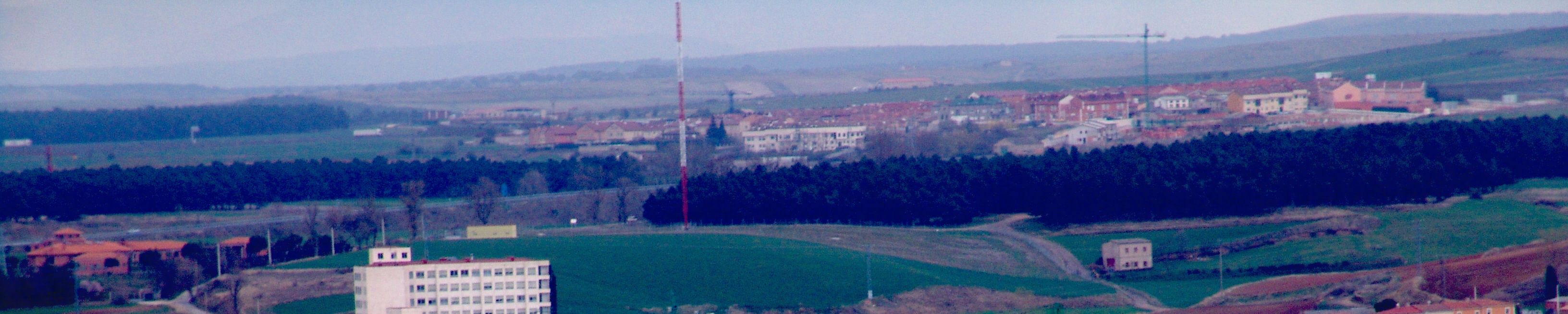 Vista del barrio de Cortes desde El Castillo, Burgos, España